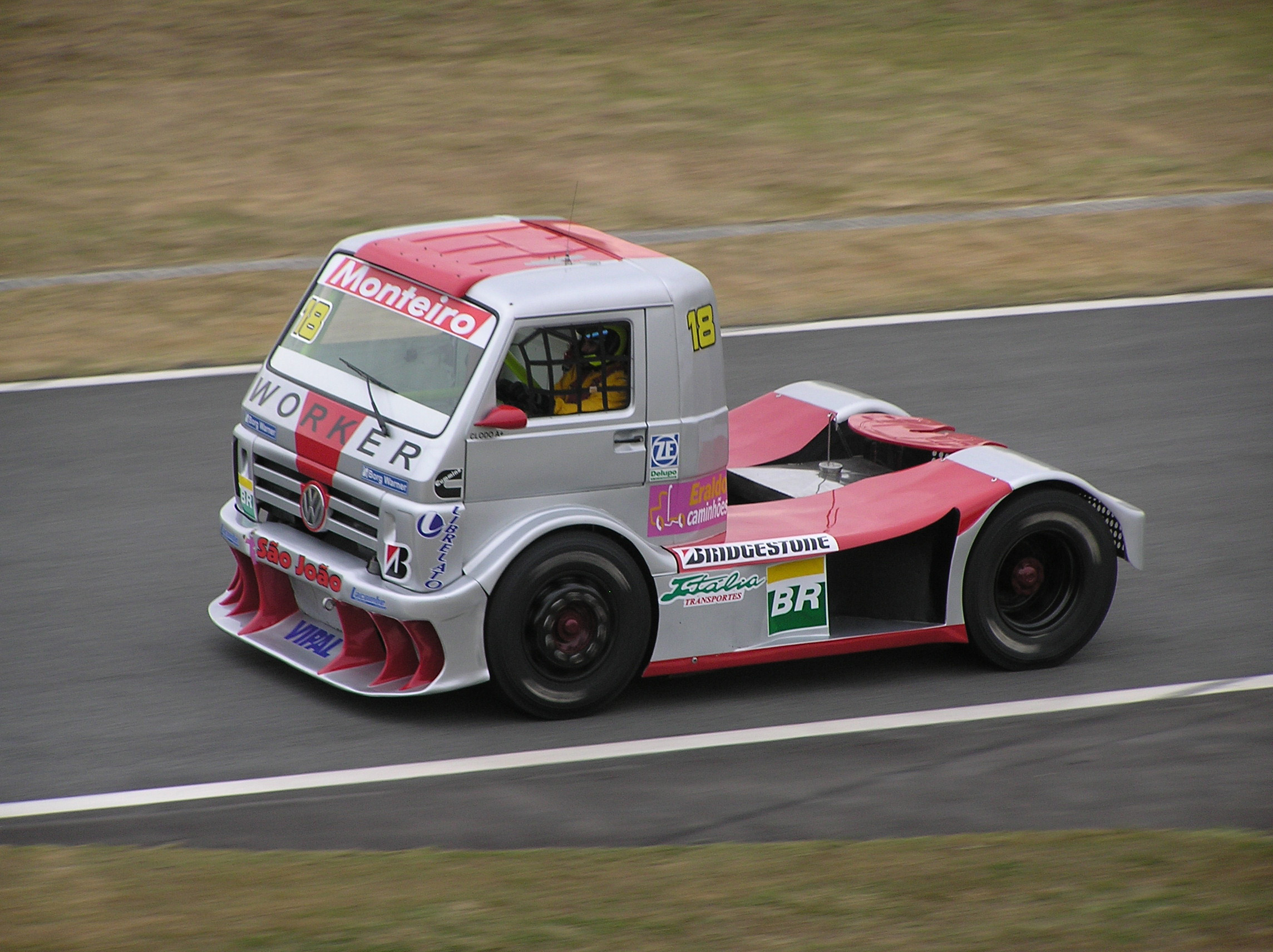 Fórmula Truck 2006 Rd.3 Interlagos: #18 Clodoaldo Monteiro